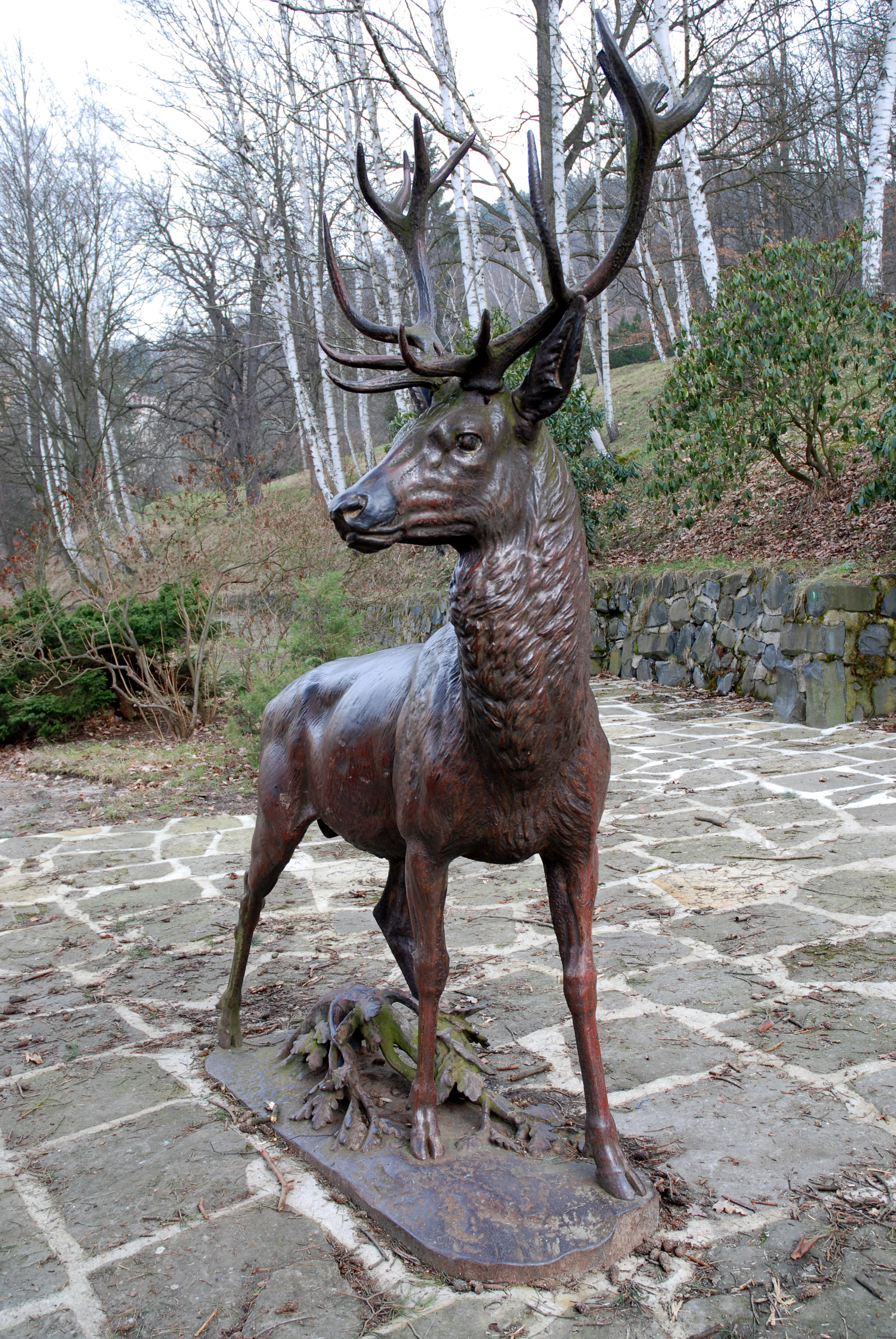 Plastika jelena v zahradě hotelu Richmond v Karlových Varech